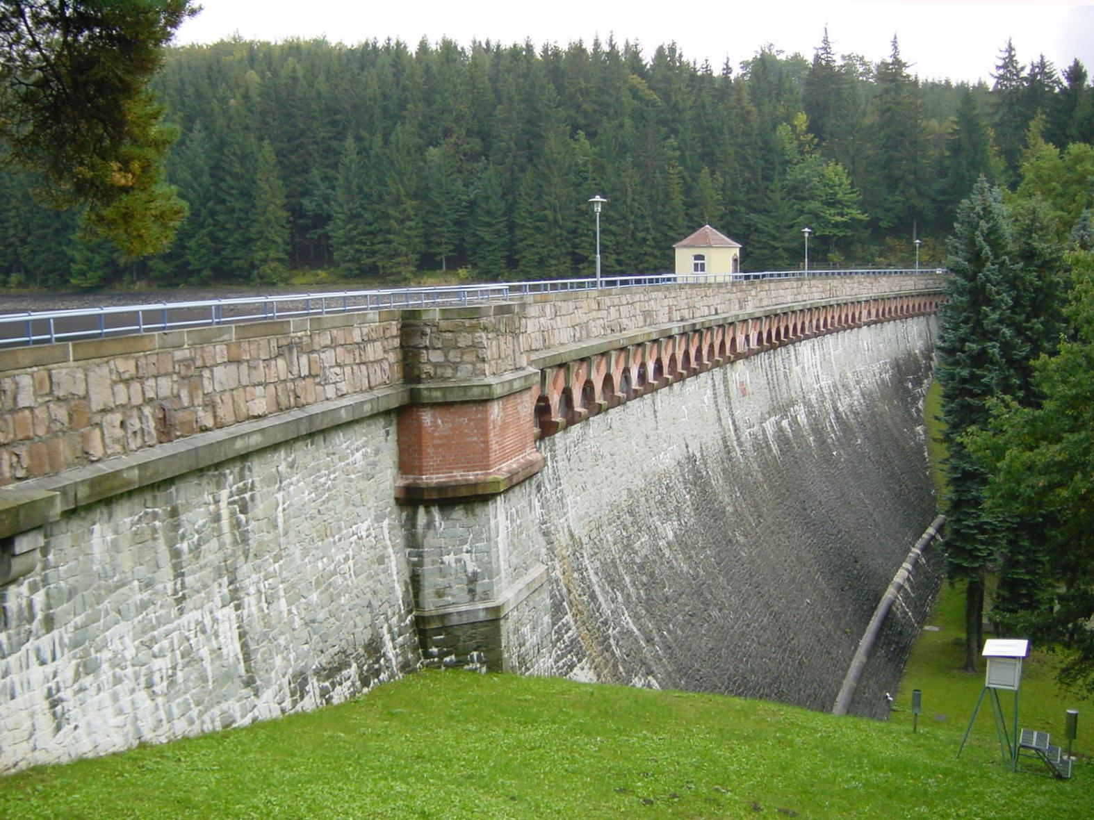 Talsperre Einsiedel in Sachsen am "Stadtguttalbach".